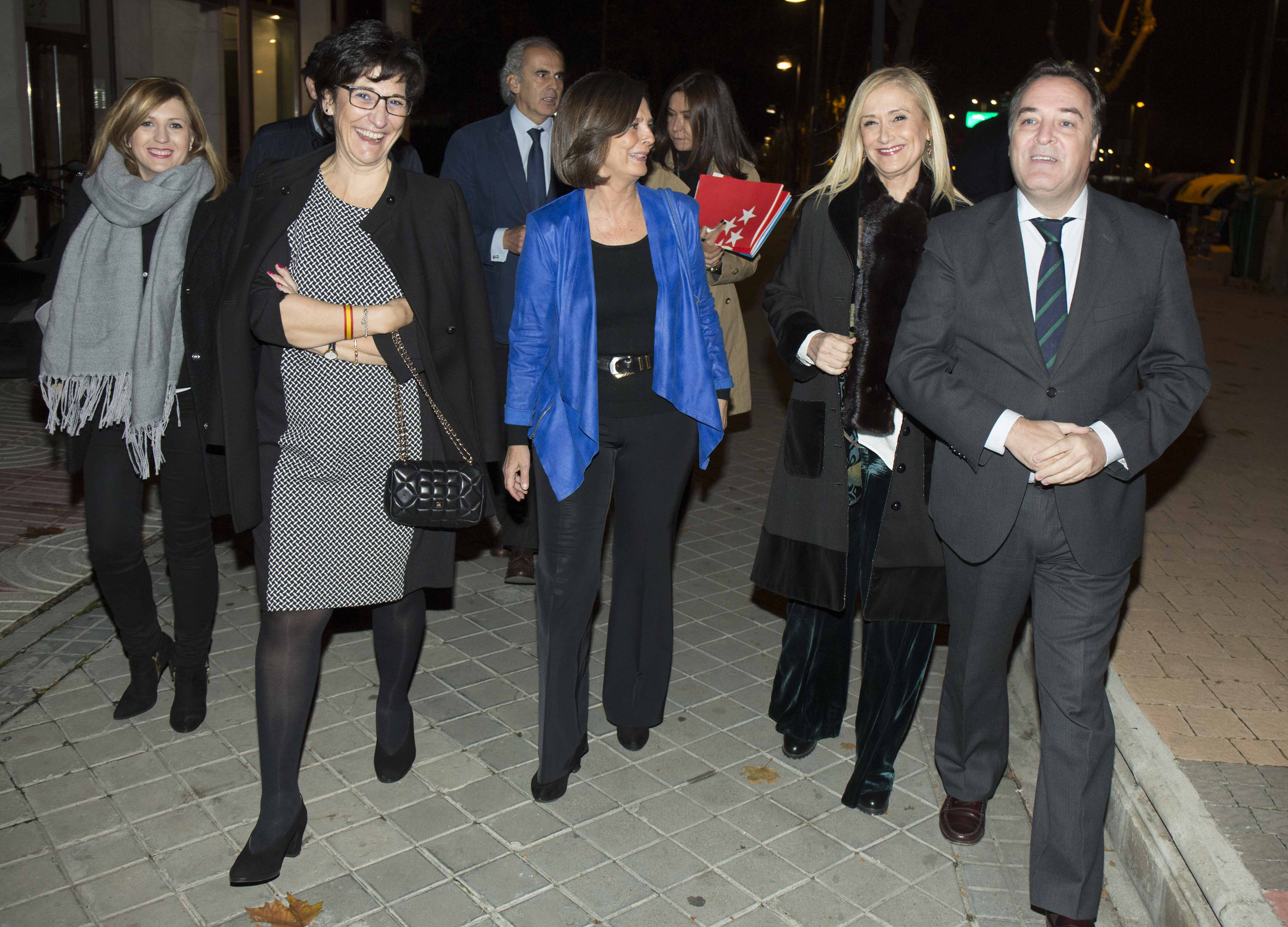 Mil gracias a Paloma Adrados, Susana Pérez Quislant y a todos los afiliados del Partido Popular de Pozuelo. Estar en Pozuelo es como estar en casa. #CifuOnTour🚙🎄